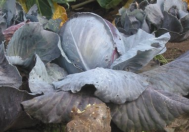 Red cabbage (Rode kool)